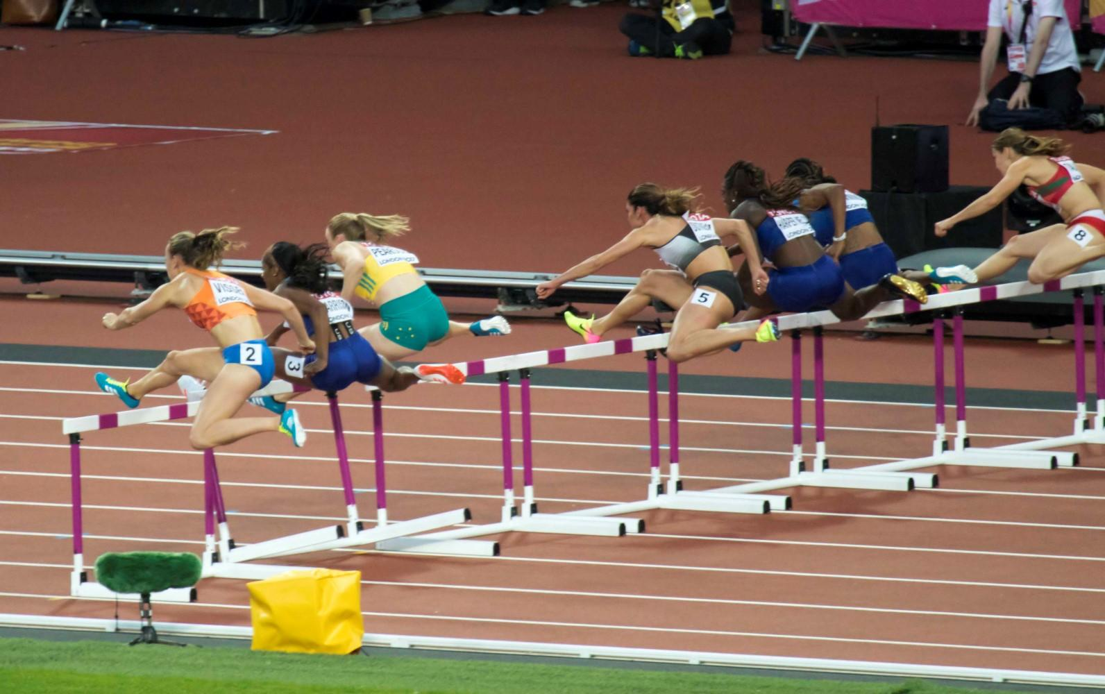 d8_22 finale 100mH dames jt